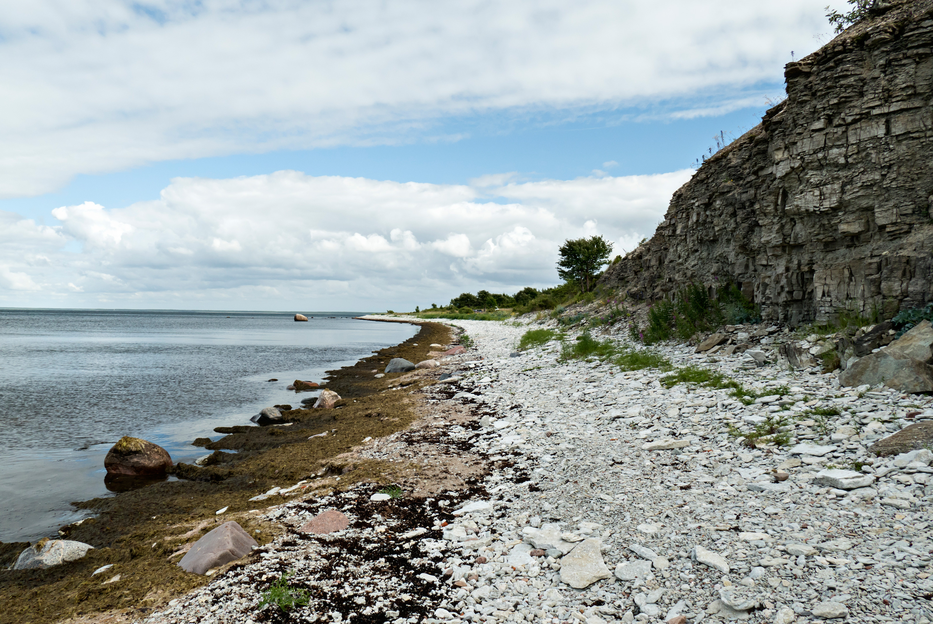 Soeginina pank Saaremaal Vilsandi rahvuspargis